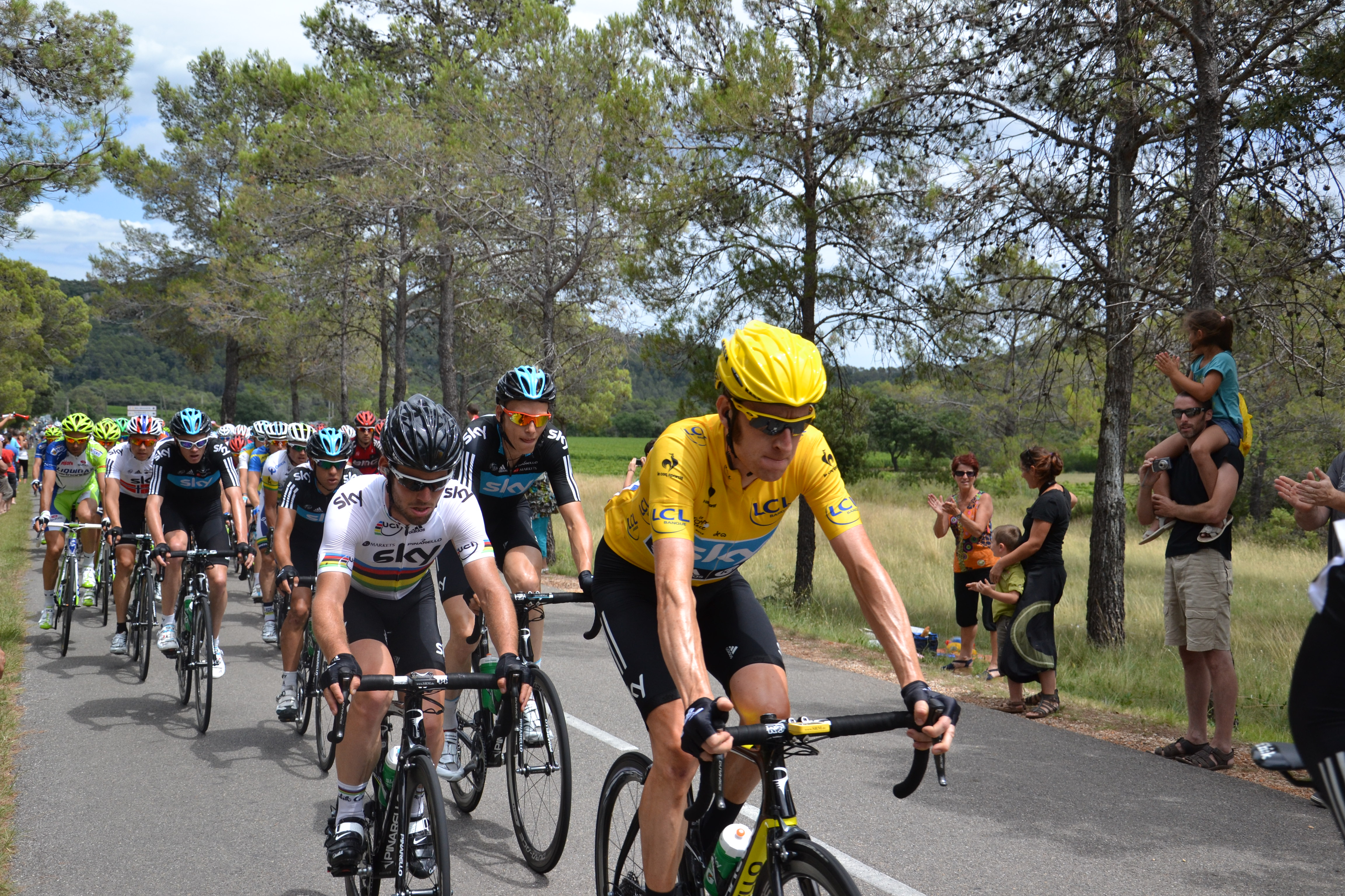 13e étape du Tour de France 2012. Passage du peloton au Pic St-Loup sur la D1 (km 120).